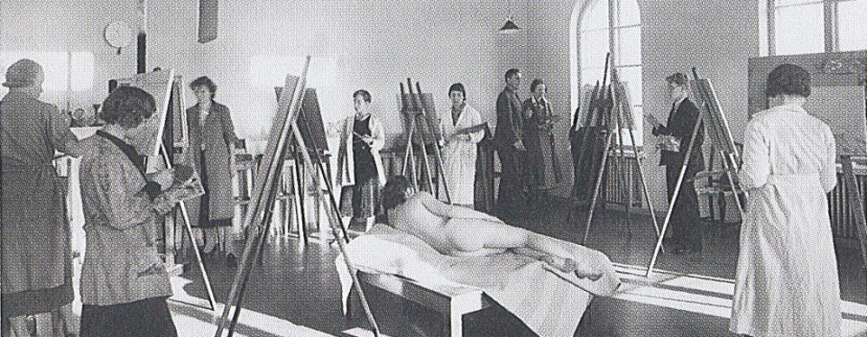 Kuva Vapaasta Taidekoulusta